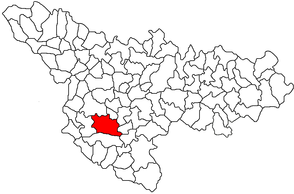 Ciacova, judetul Timis Licensing Categorie:Hărţi ale judeţului Timiş